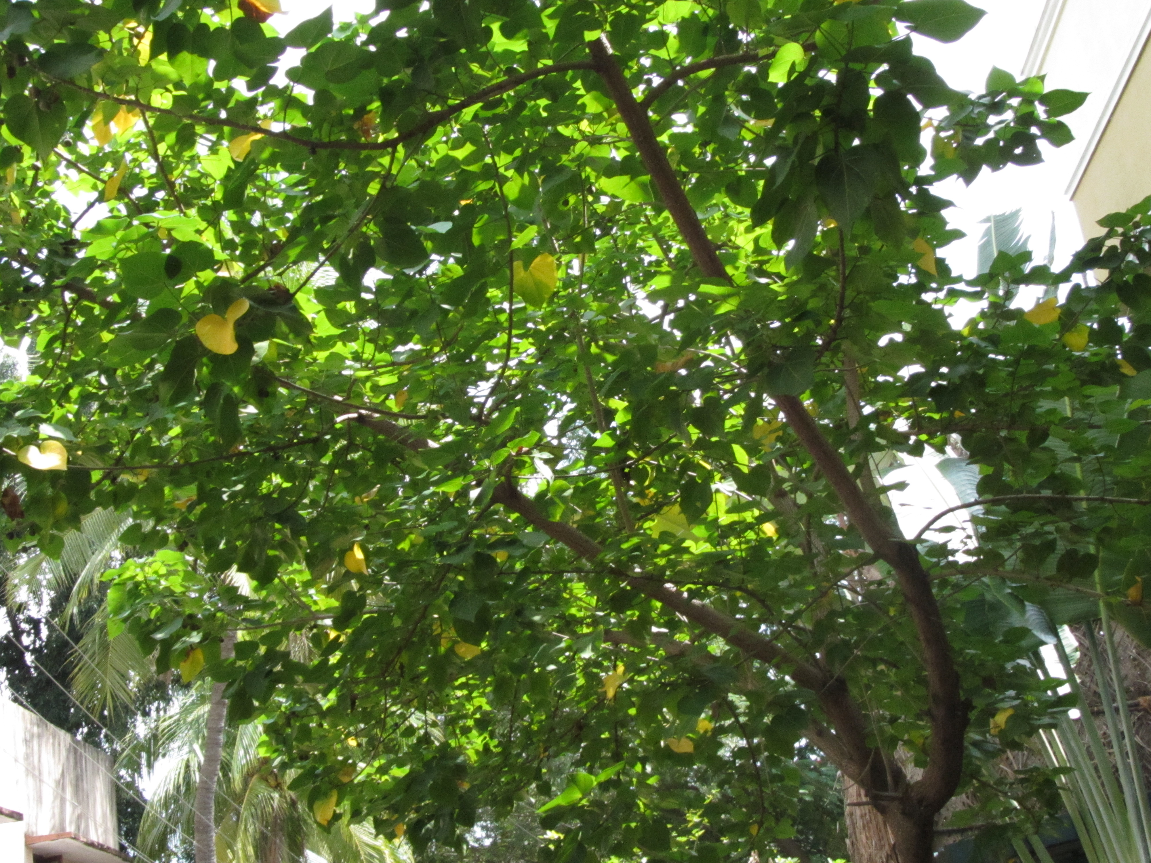 own shot. Portia tree. பூவரசு. (பூவரச மரம்) சங்ககால இலக்கியம் குறிஞ்சிப்பாட்டு நூலில் இதன் பூவின் பெயர் குடசம் எனக் குறிப்பிடப்பட்டுள்ளது